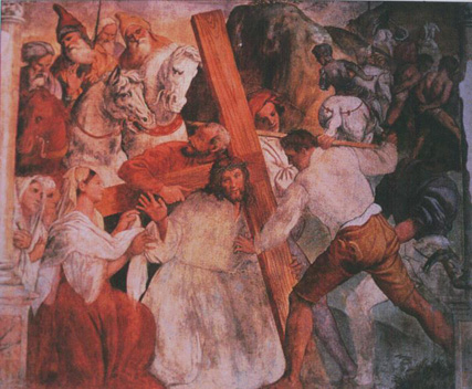 Stefano dall'Arzare - Gesù cade sotto la croce - Oratorio Redentore Padova affresco